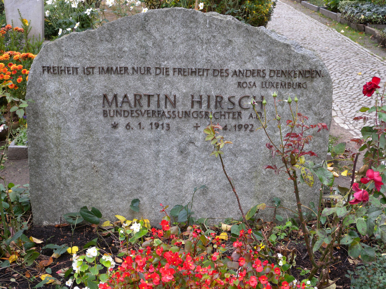 Grabmal von Martin Hirsch auf dem St. Annen-Friedhof in Berlin-Dahlem